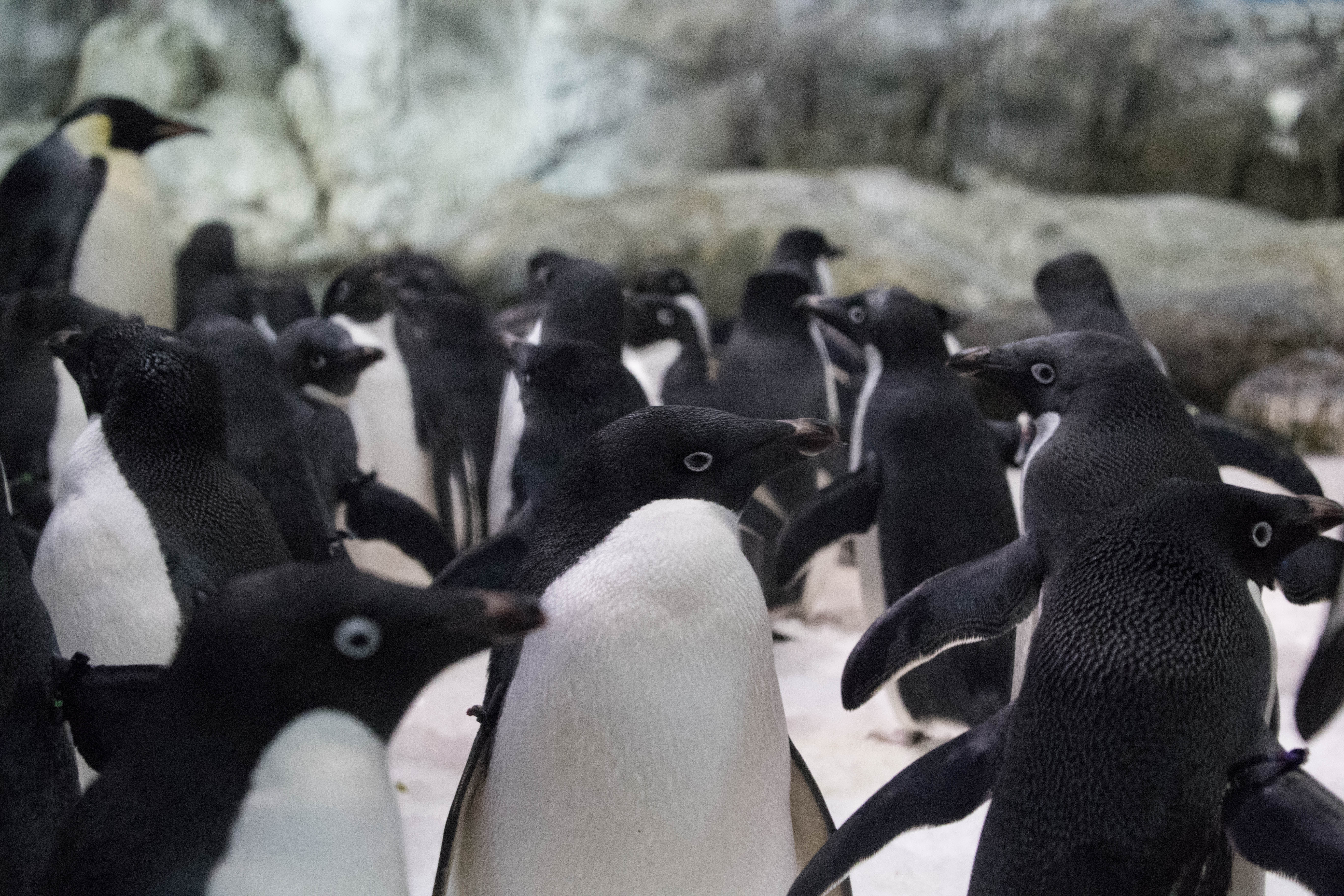 At Wakayama Adventure World in Japan